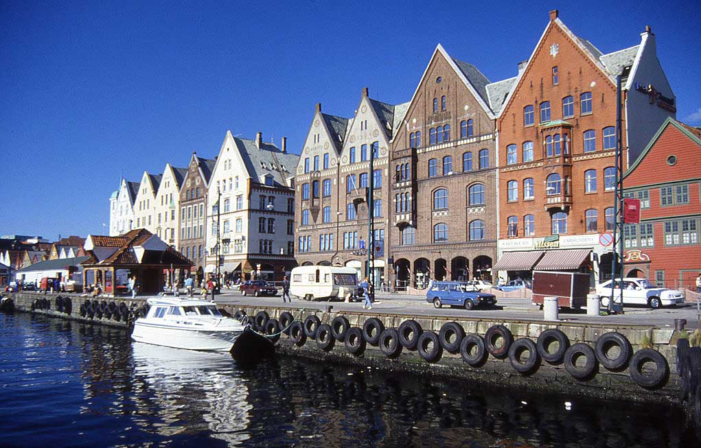 Bryggen i Bergen